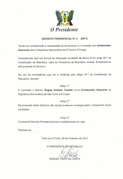 Decreto com assinatura do presidente da República democrática de São Tomé e Príncipe, Manuel Pinto da Costa em 2012.